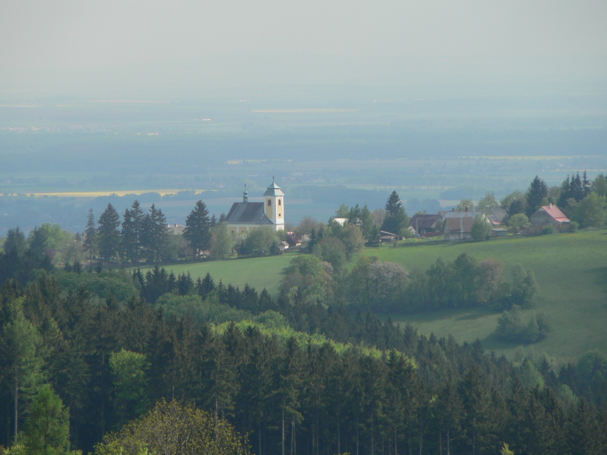 Ruda (Tvrdkov)